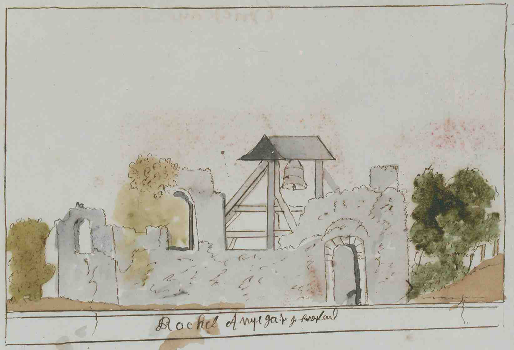 Korte Beschreijving van de Steden Dorpen Gehugten en Heeren-huizen der Heerlykheid Vriesland Benevens Desselfs Afbeeldingen Meest na 't leven getekent By een Vergaderdt Door Andries Schoemaker